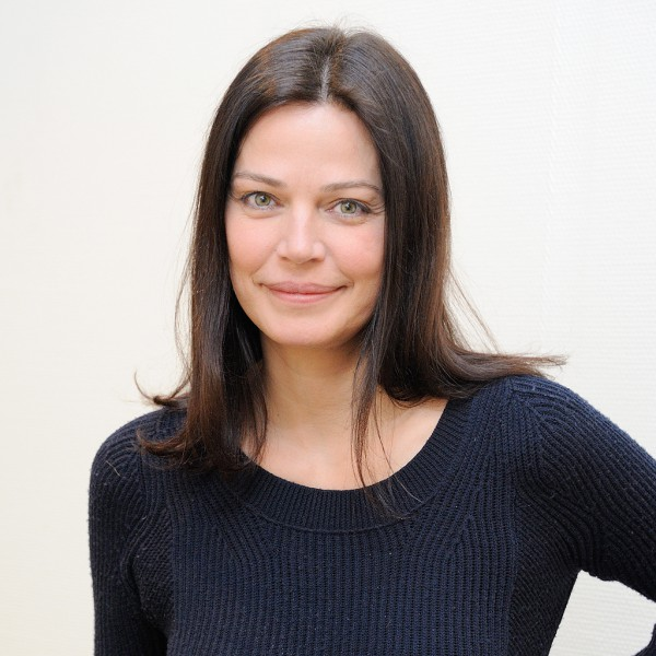 photo Marianne Denicourt